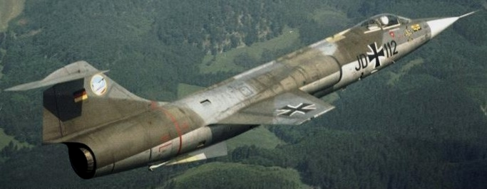 A West German Luftwaffe Lockheed F-104G Starfighter from Jagdgeschwader 74 "Mölders" (74th Fighter Wing) in flight in June 1965.